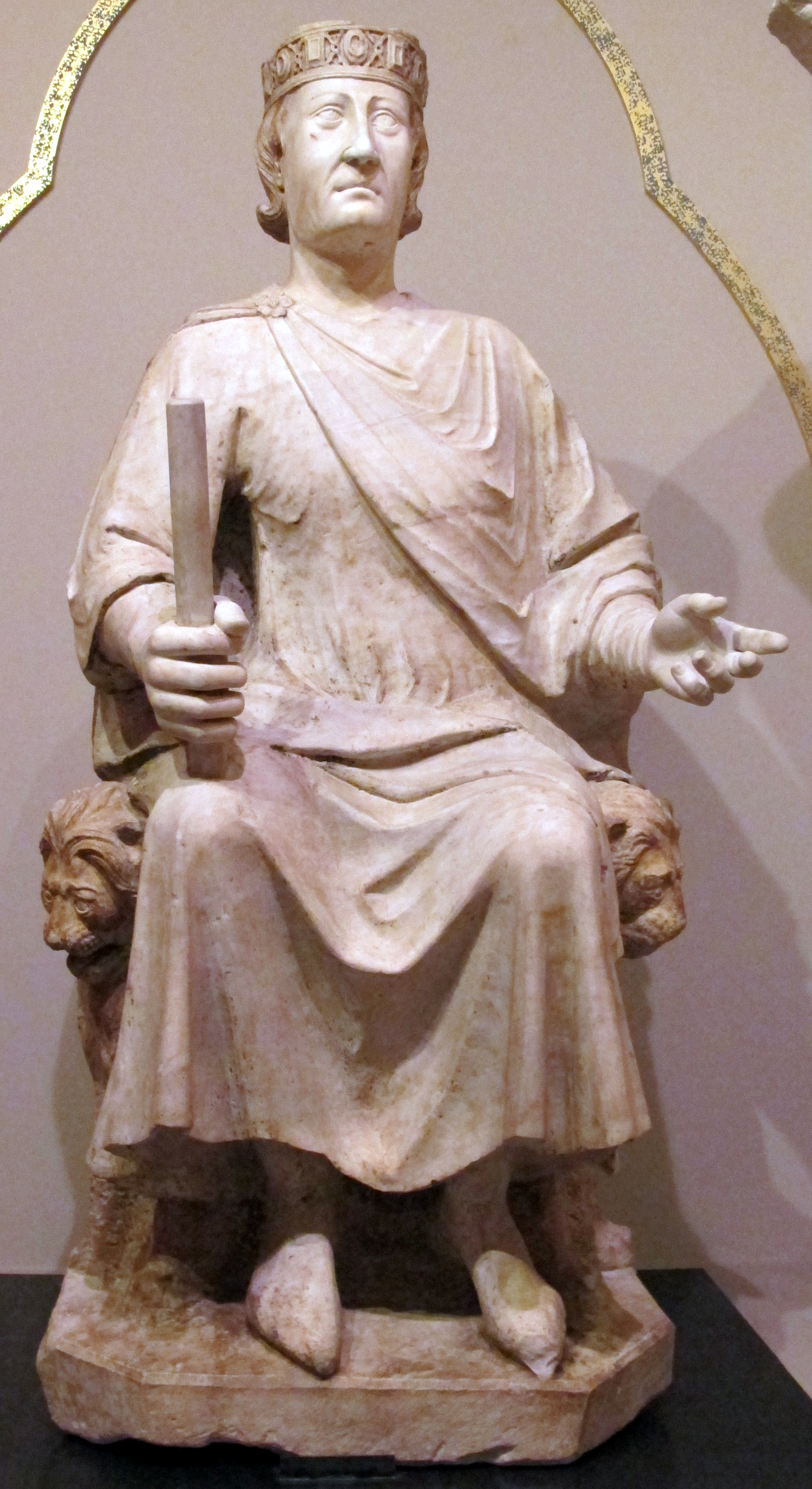 Collezione dei Musei Capitolini